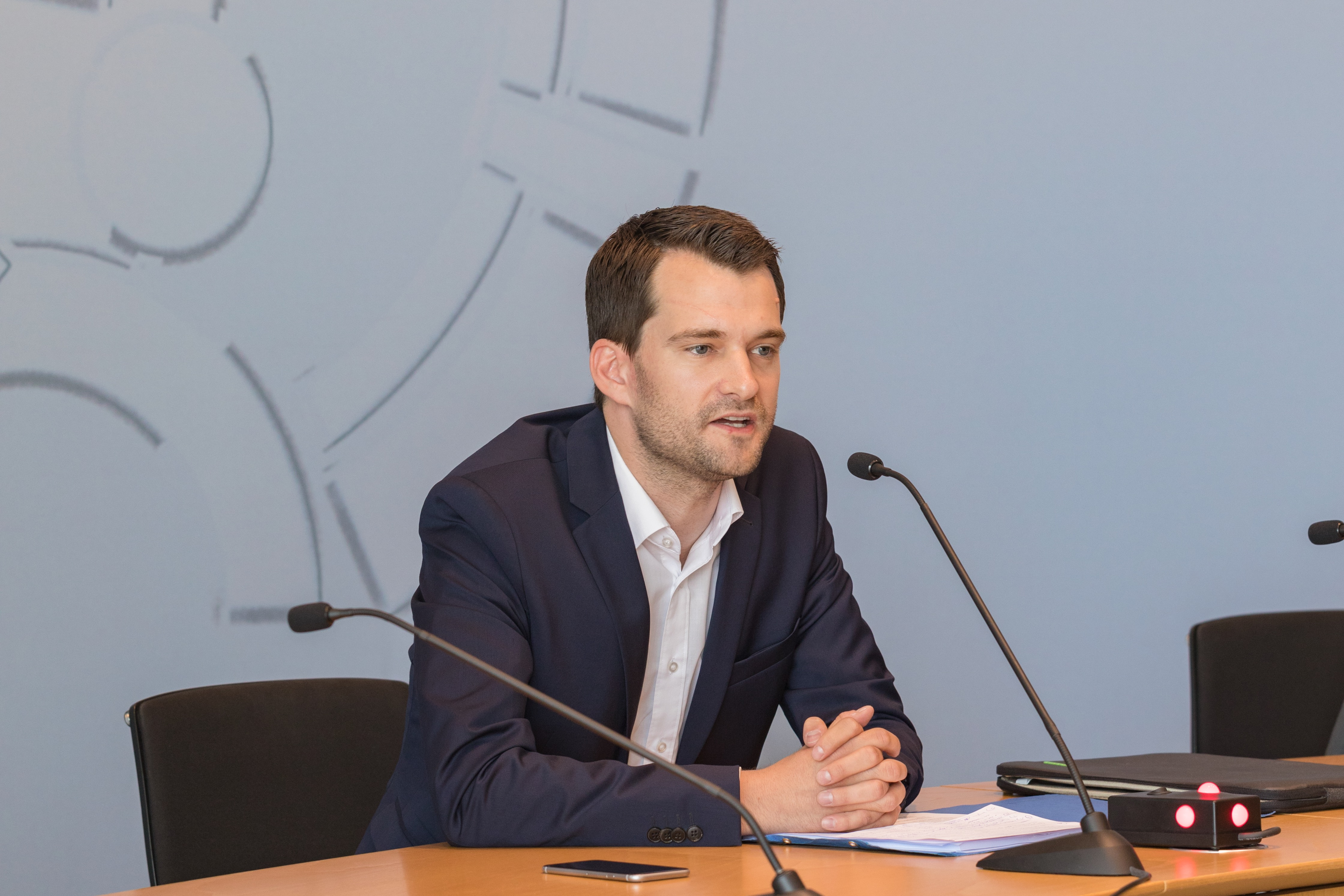 Johannes Vogel stellt das Ergebnis des Mitgliederentscheids der FDP NRW zum schwarz-gelben Koalitionsvertrag vor.